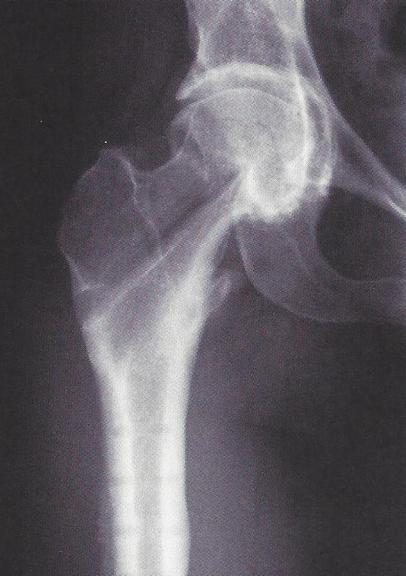 Röntgenbild nach intertrochanterer Valgisierungsosteotomie wegen Coxa vara bei 43-jähriger Patientin. Die Winkelplatte ist bereits entfernt.